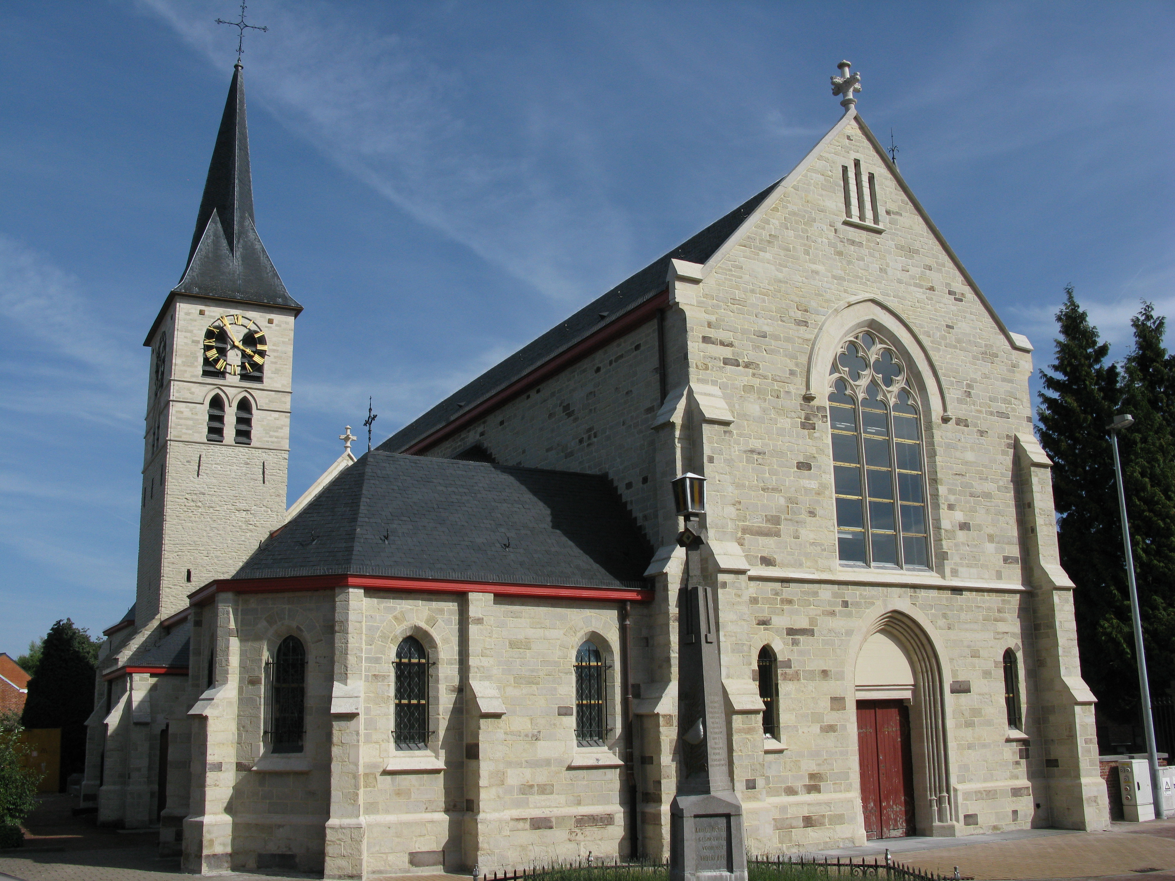 Sint-Clemenskerk in Eppegem (Zemst)